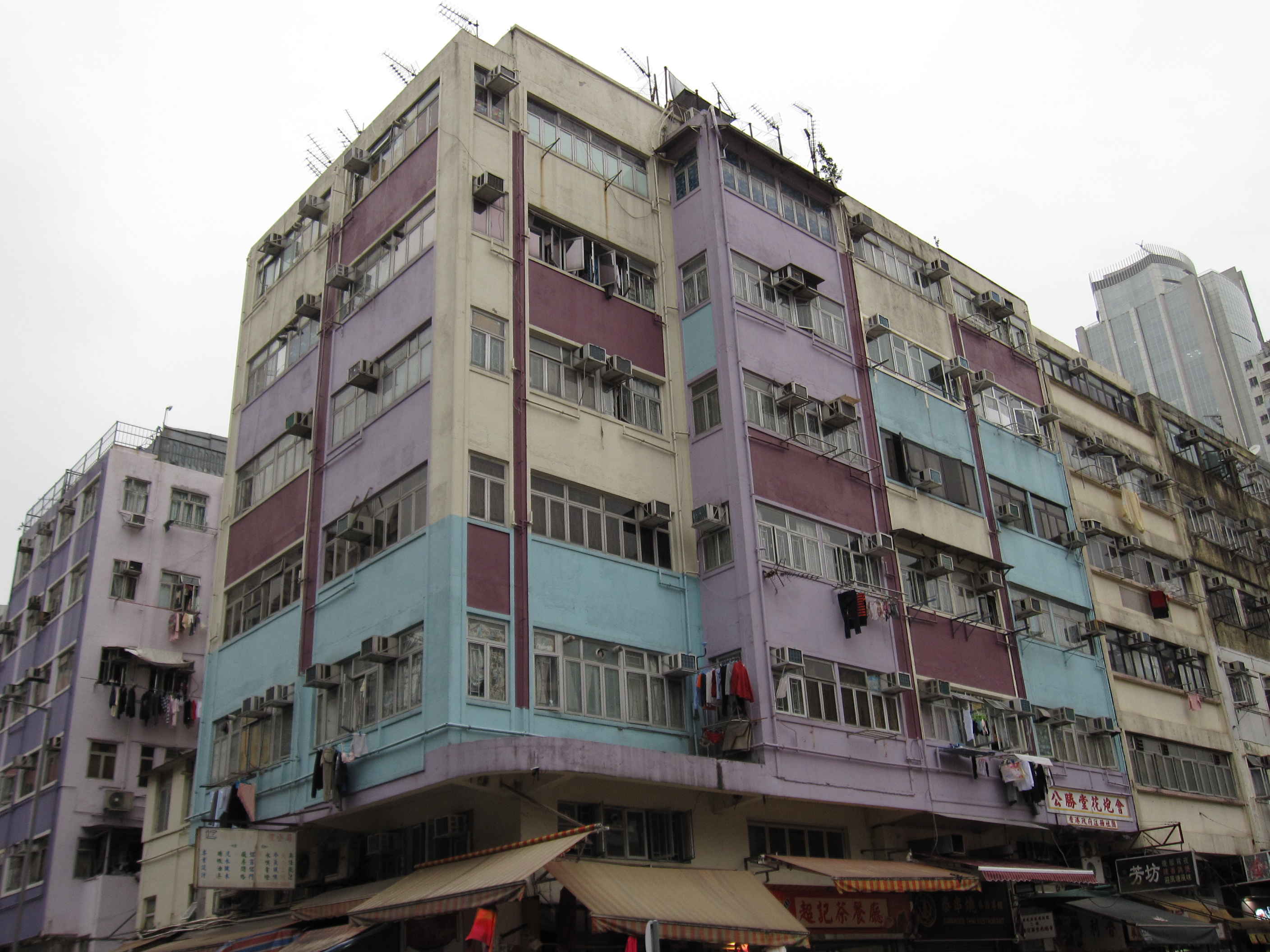 中文（香港）: 德仁樓第一期。